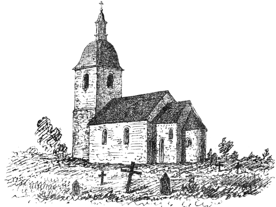 Östra Tollstads gamla kyrka i Östergötland. Teckning i "Utdrag af Antiqvitets-Intendenten P. A. Säves afgifna berättelse för år 1861", publicerad i Antiqvarisk tidskrift för Sverige band 1, 1864.